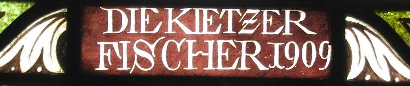 Schriftzug "Fischer am Kietz" in einem Kirchenfenster der Dorfkirche Gröben, Brandenburg Selbst fotografiert August 2004 GNU FDL